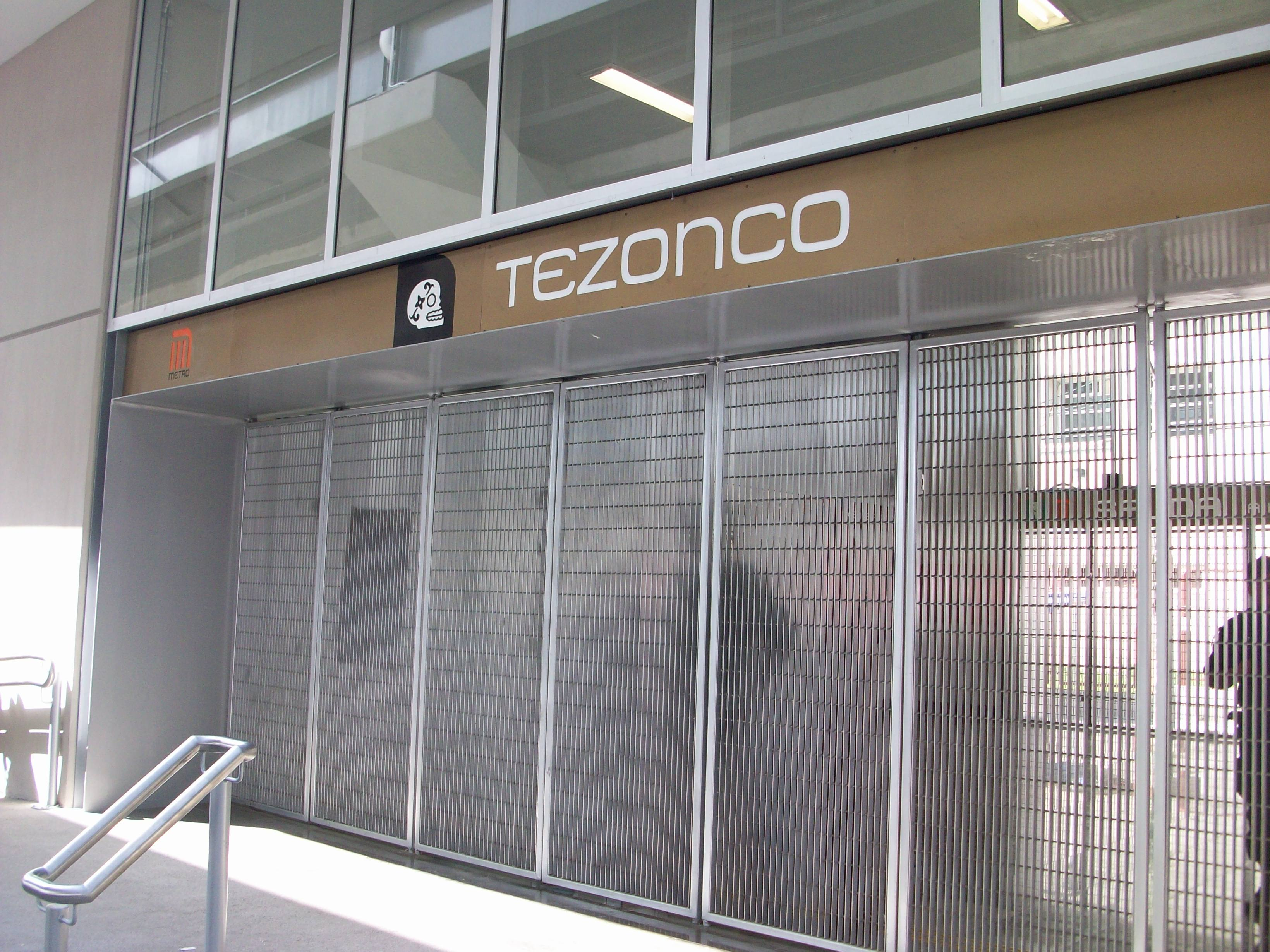 Acceso estacion Tezonco